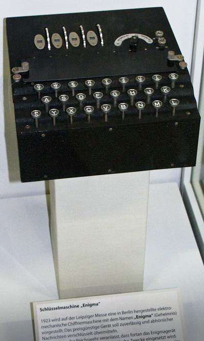 Bundeswehrmuseum Dresden mit Teilen von der NVA Source: Jan Rehschuh